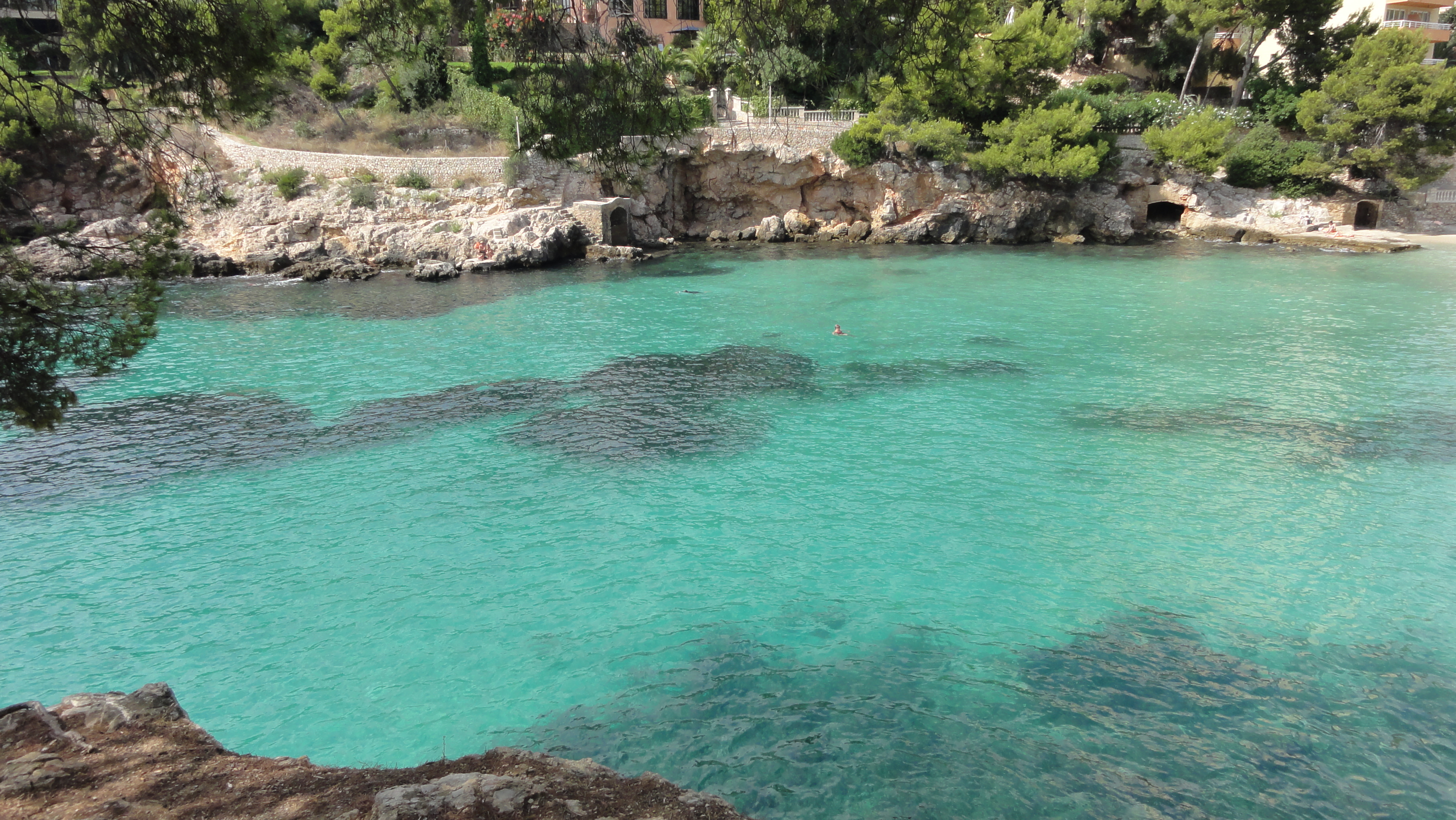 Costal Portals, Illetas, Mallorca